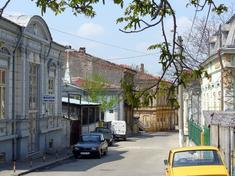 O strada din centrul vechi al Slatinei, judetul Olt.